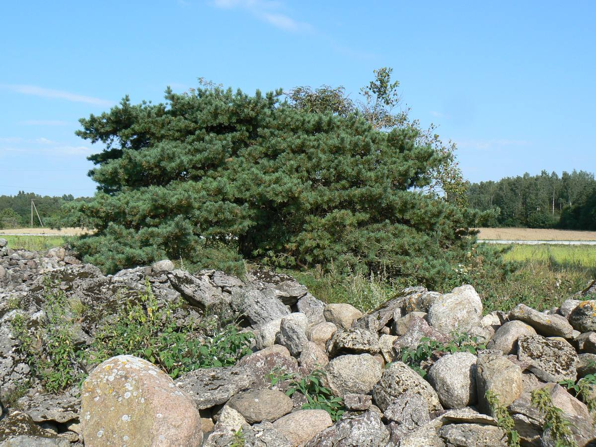 Luha kääbusmänd